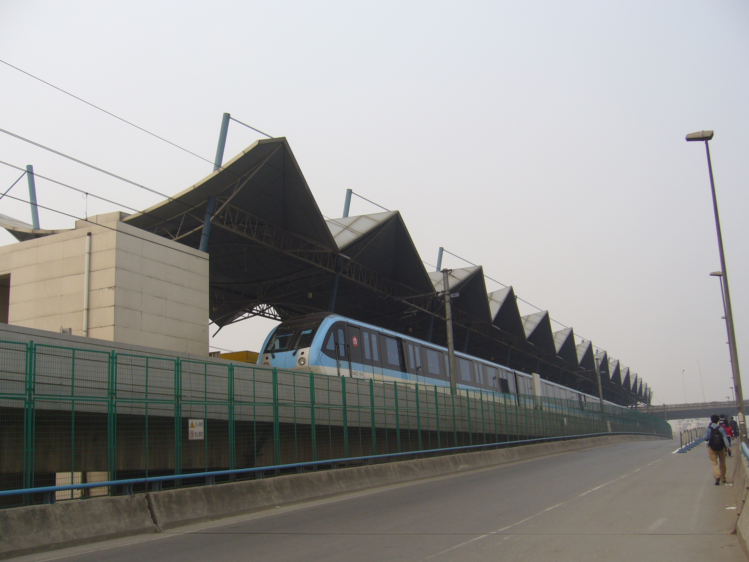 地铁中华门站